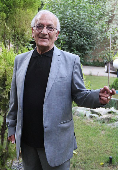 جلال مقامی - مراسم تجلیل از چهار دوبلور پیشکسوت صدا و سیما ۱۳۹۲/۴/۸